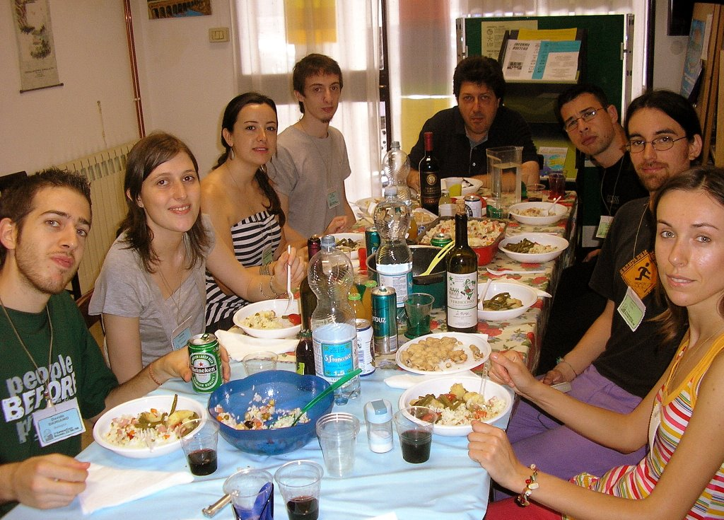 Kuna tagmanĝo en la sidejo de la Bolonja Esperanto-Grupo (GEB), en Italio, dum la unua EsperanTago, porjunula renkontiĝo mastrumata de la GEB kune kun la Itala Esperantista Junularo.